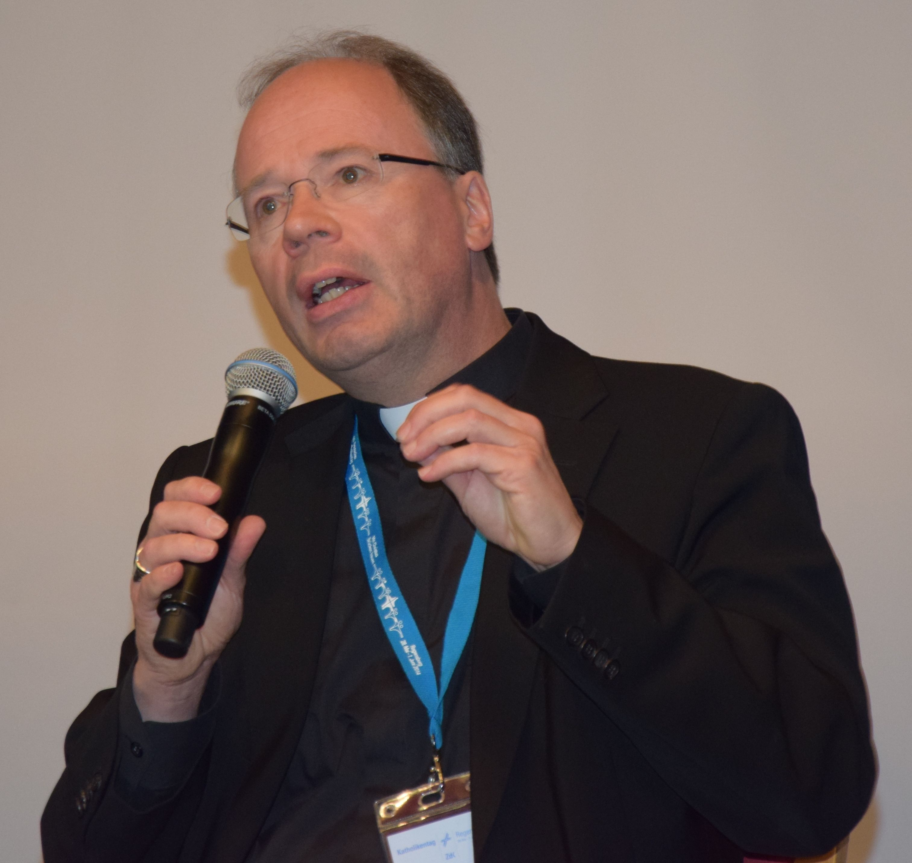 Bischof Dr. Stephan Ackermann, Beauftragter der DBK für Fragen sexuellen Missbrauchs Minderjähriger im kirchlichen Bereich, Trier, Podium "Kirche auf dem Weg zu einer Kultur der Achtsamkeit?", 99. Deutscher Katholikentag in Regensburg